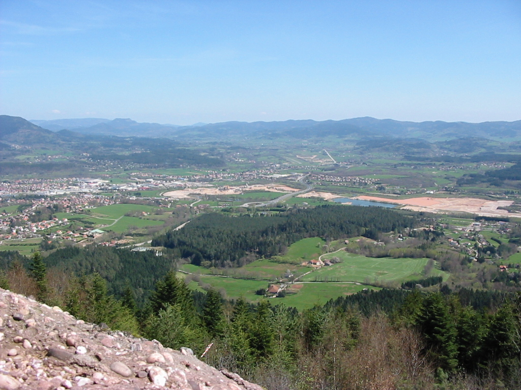 Panorama des communes de la CC de la Fave et de la Meurthe, dans l'arrondissement de Saint-Dié-des-Vosges. Photographie personnelle prise depuis le massif du Kemberg.